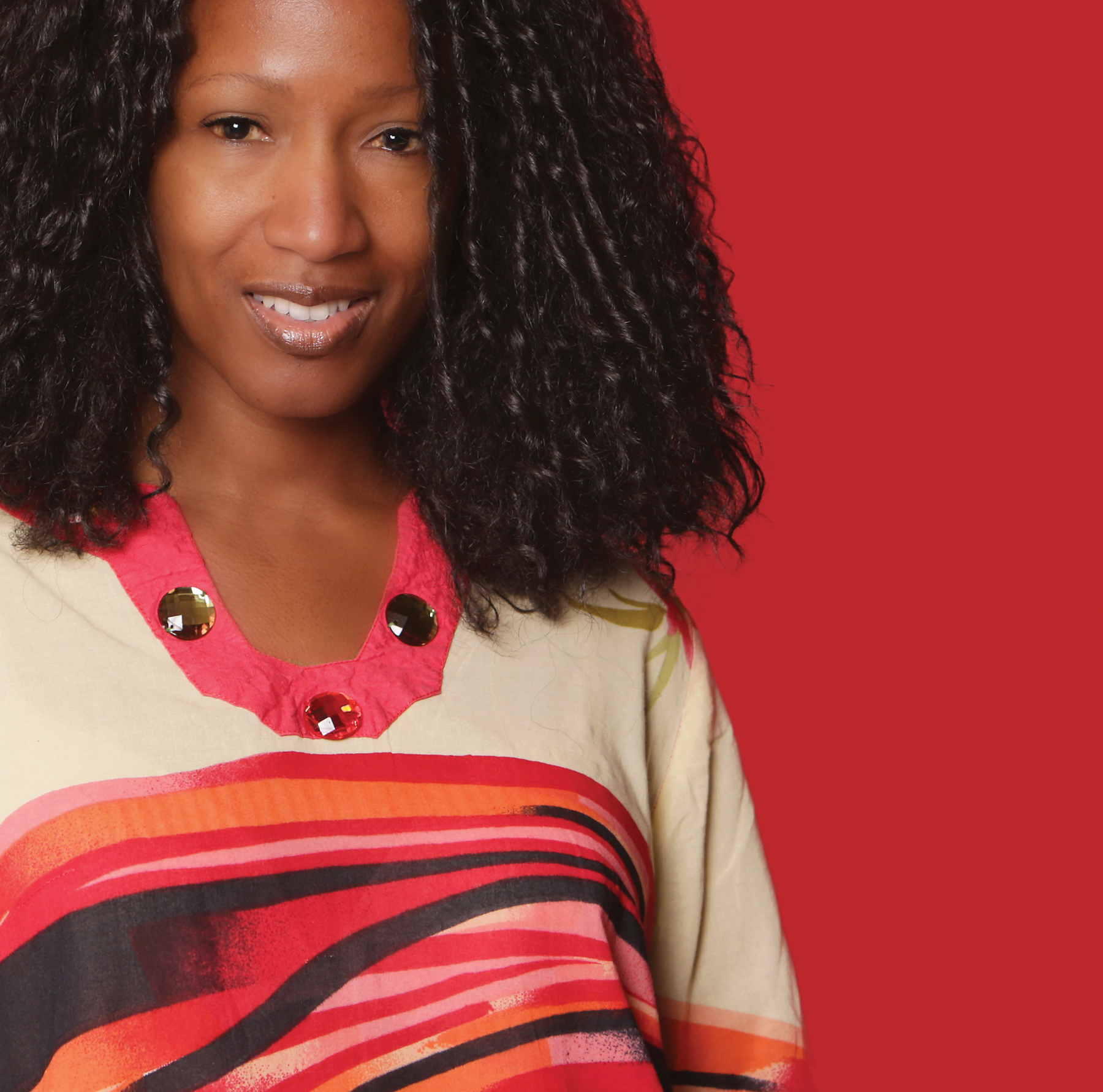 Fuambai Sia Ahmadu, anthropologist